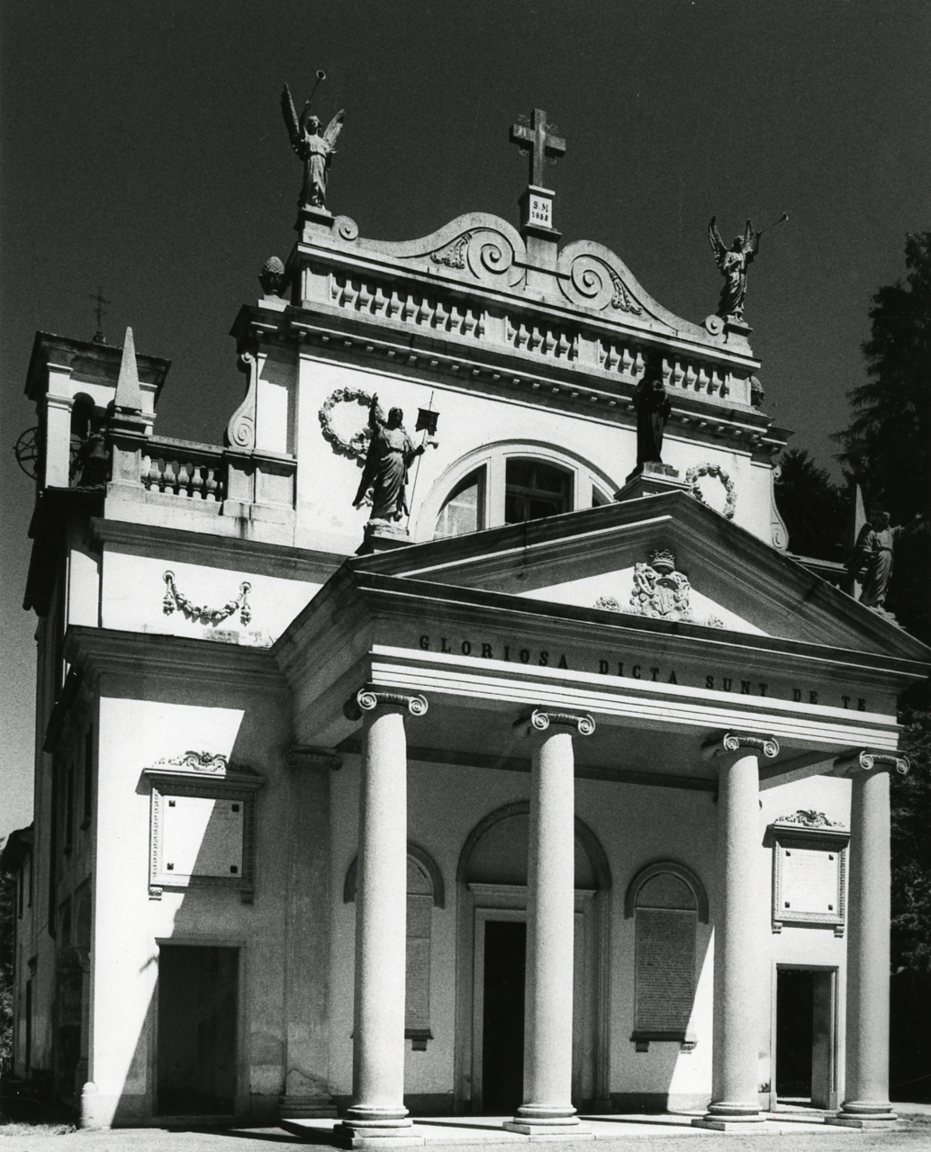 Servizio fotografico : Ameno, 1980 / Paolo Monti. - Stampe: 3 : Positivo b/n, gelatina bromuro d'argento/ carta, 21x27, 24x30. - ((Al verso delle stampe manoscritti i numeri dei negativi (e dei fogli di provini dei negativi) corrispondenti secondo altra numerazione (riportata anche nei fogli dattiloscritti conservati nella scatola "Lago d'Orta", numerata 44): A7/3, A18/20; iscrizione didascalica manoscritta a matita: "Vacciago"; timbro a inchiostro con copyright: "© Copyright/ Credit to/ Paolo Monti/ Corso Sempione [...]/ Milano". - Sul coperchio della scatola iscrizione didascalica manoscritta a pennarello nero: "Cusio Ossola". - Occasione: Documentazione per la pubblicazione: Alberti Luigi, Rainaldi Giancesare, Rizzi Enrico (a cura di), "Elogio del Lago d'Orta", Anzola d'Ossola-Valstrona, Fondazione arch. Enrico Monti-Lo Strona, 1983. - Fonte: Fattura di Paolo Monti: IV. Commesse/ Fattura n. 06/ Riprese fotografiche città di Orta e Lago d'Orta (1982/04/10), presso Archivio Paolo Monti. N. 450 fotografie formato 24x30. - Fonte: Monografia di Alberti Luigi, Rainaldi Giancesare, Rizzi Enrico: Elogio del Lago d'Orta, Anzola d'Ossola-Valstrona, Fondazione arch. Enrico Monti-Lo Strona (1983). Alberti Luigi, Rainaldi Giancesare, Rizzi Enrico (a cura di)